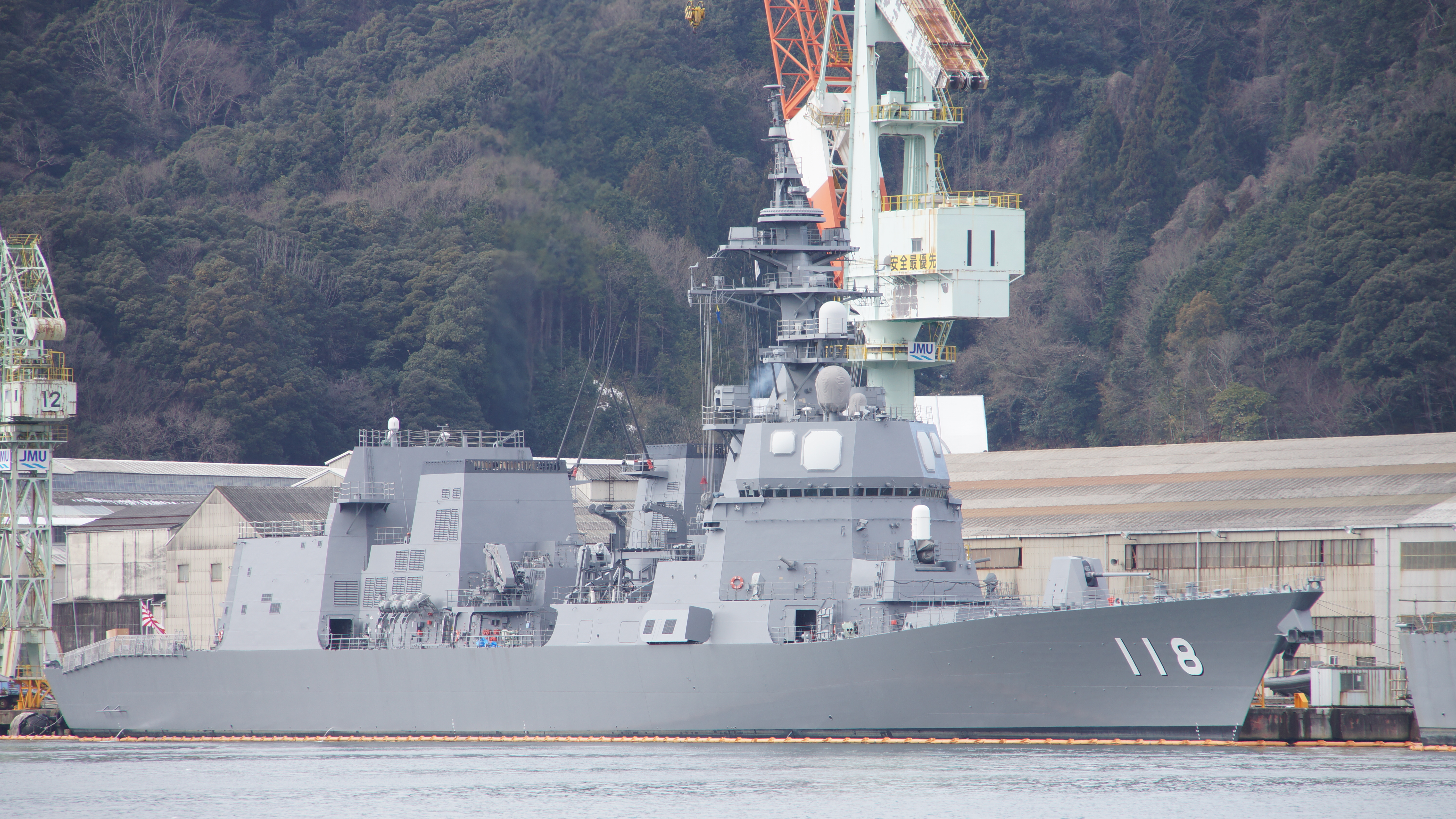 ジャパン マリンユナイテッド舞鶴事業所にて修理・停泊中の護衛艦ふゆづき（DD-118）。2017年1月21日 海上自衛隊舞鶴基地から撮影。